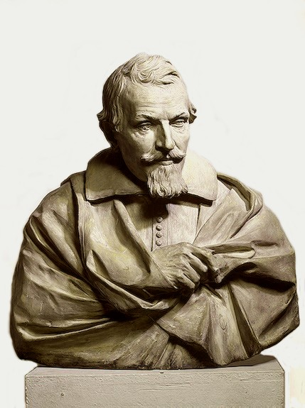 Busto di Gasparo Mola